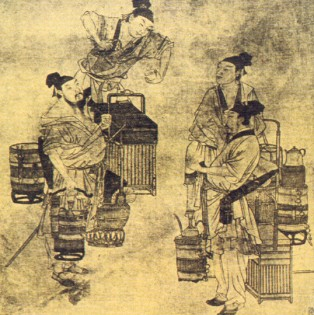 元赵孟頫斗茶图。